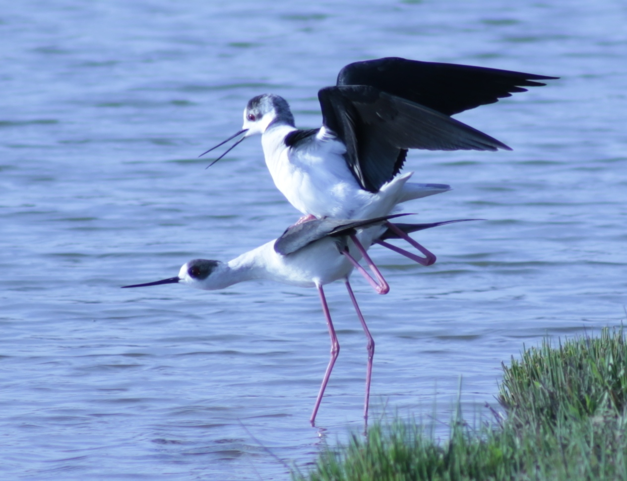 accoppiamento di una coppia di cavalieri d'Italia